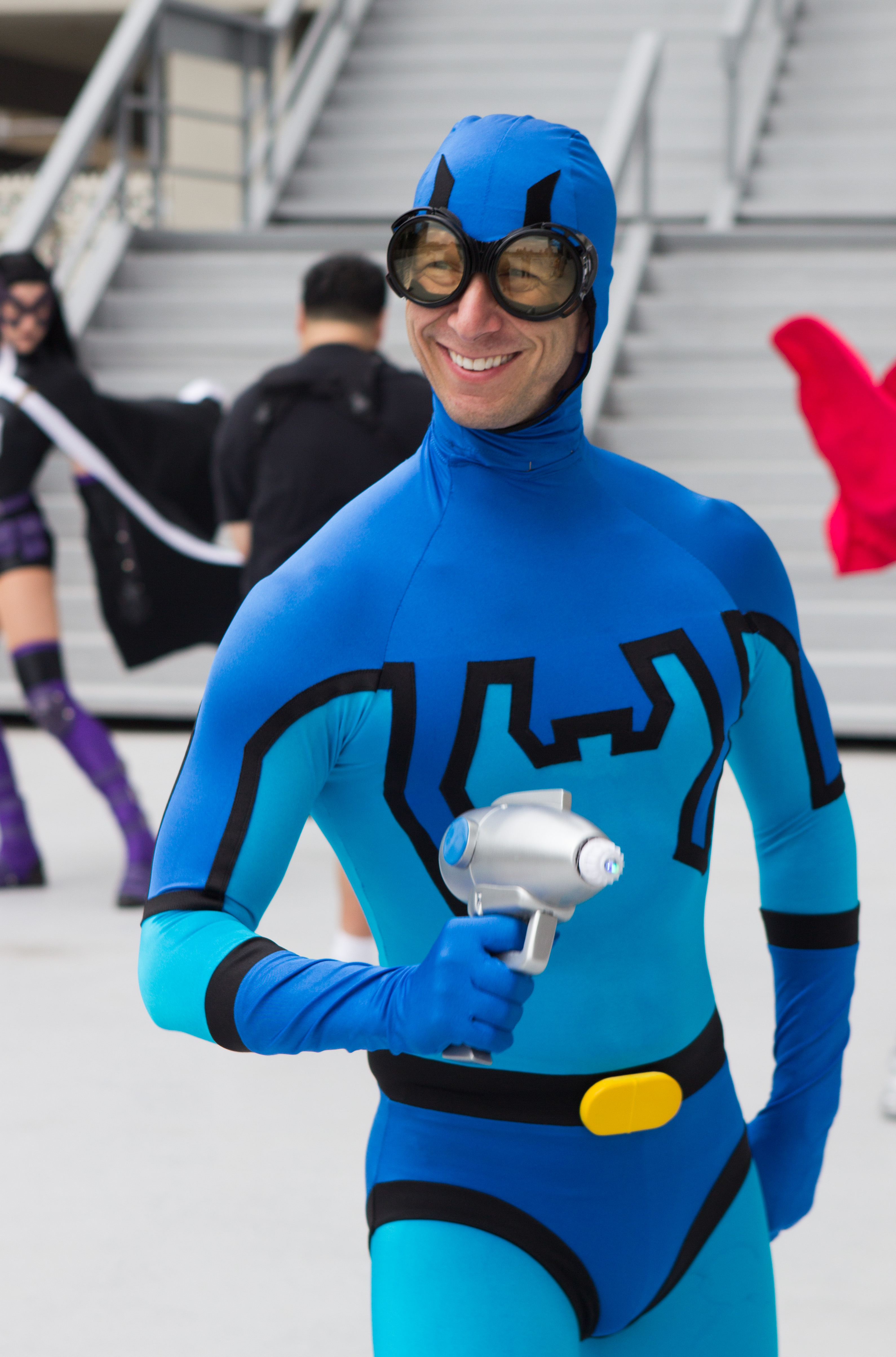 Cosplay at Dragon*Con 2013.